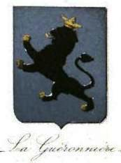 "La Guéronnière"